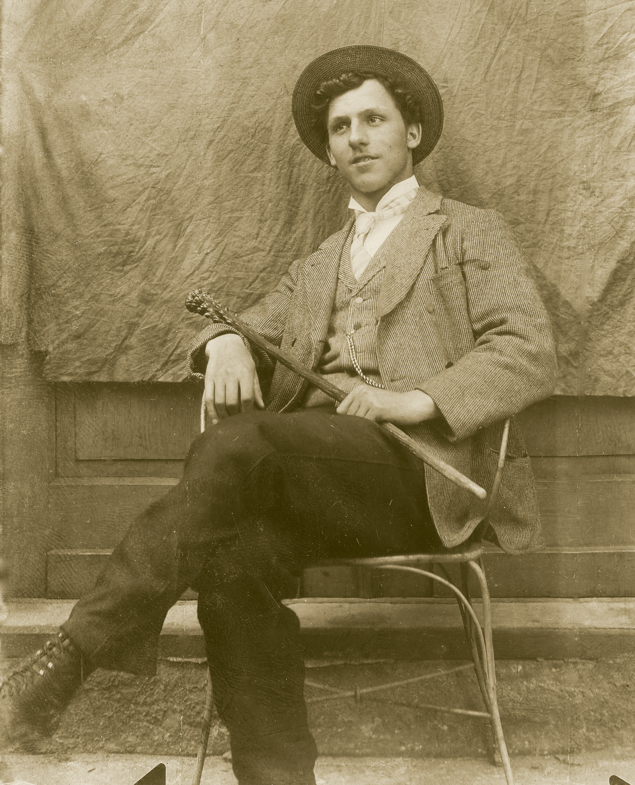 Zelfportret Emil Epple, 1893